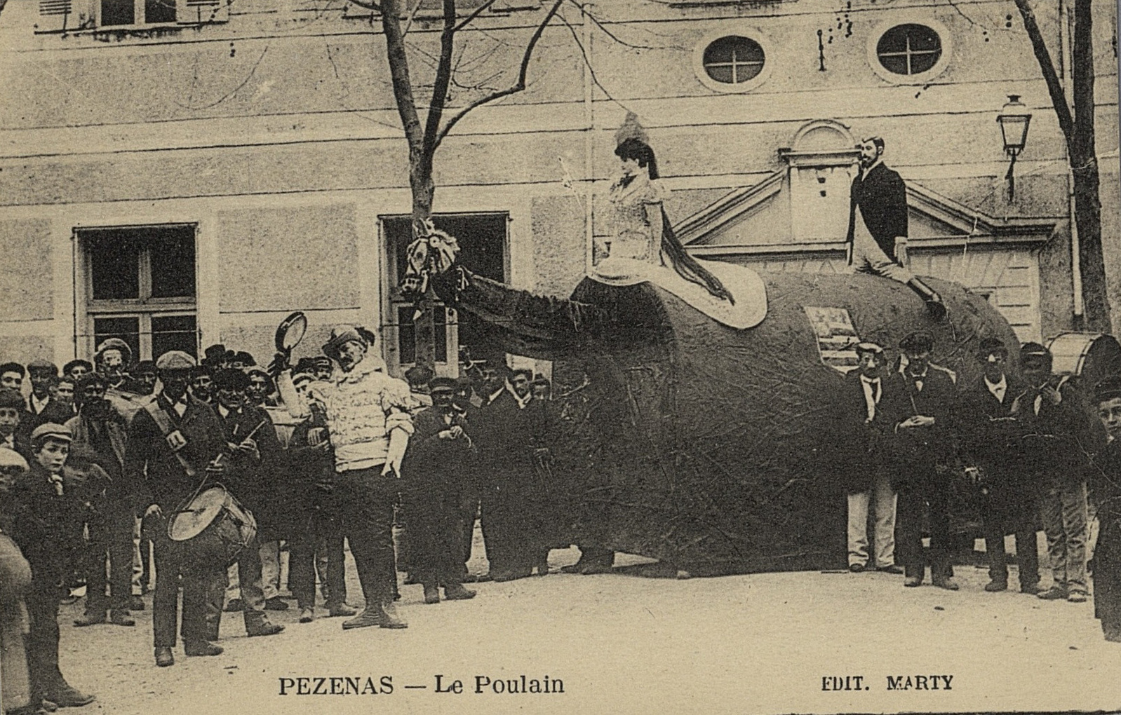 Pezenas le Poulain - Archives départementales de l’Hérault - FRAD034-50FI-0320-00001